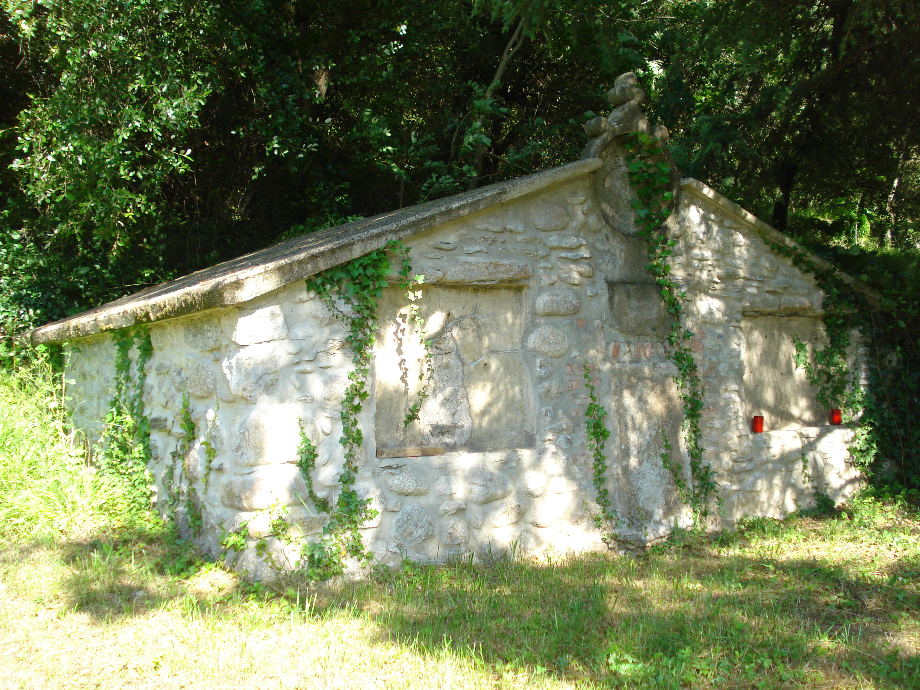 Génolhac (Gard, Fr), le caveau familial où est enseveli Jean-Pierre Chabrol, auprès de son mas ancestral du Gravas, au village de Pont-de-Rastel.